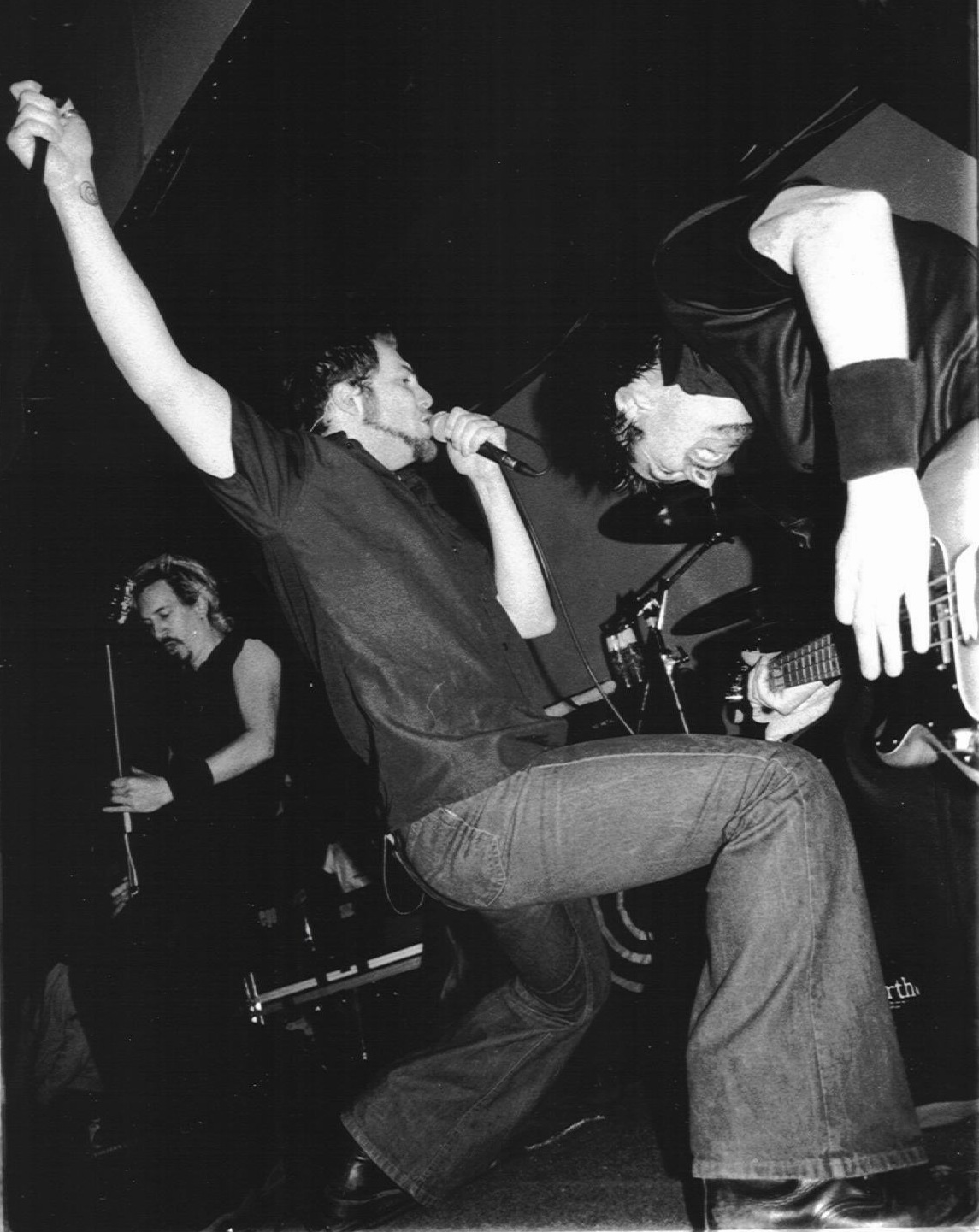 Owen Packard, Karl Middleton und Dave Anderson (v.l.n.r.) von earthtone9 live auf der Abschiedstour 2002